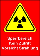 Schild zur Kennzeichnung eines Sperrbereiches gem. deutscher Strahlenschutzverordnung (StrlSchV)